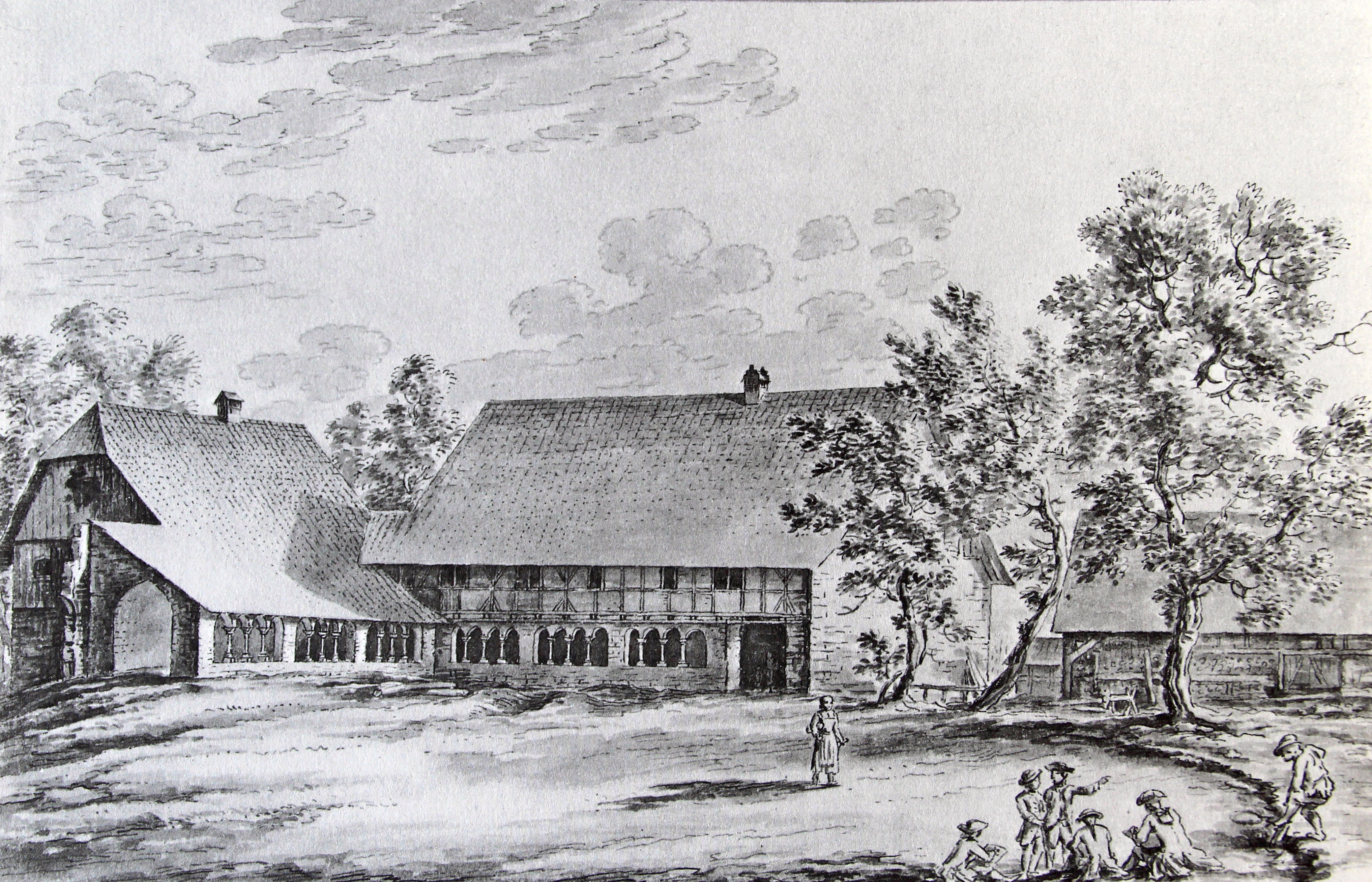 Kloster St. Martin, Zürich um 1780. Aquatinta